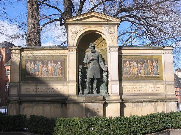 Denkmal für den Augenarzt „Albrecht von Graefe", ausgeführt 1882 von „Rudolf Leopold Siemering". Standpunkt: an der Charité, Berlin.